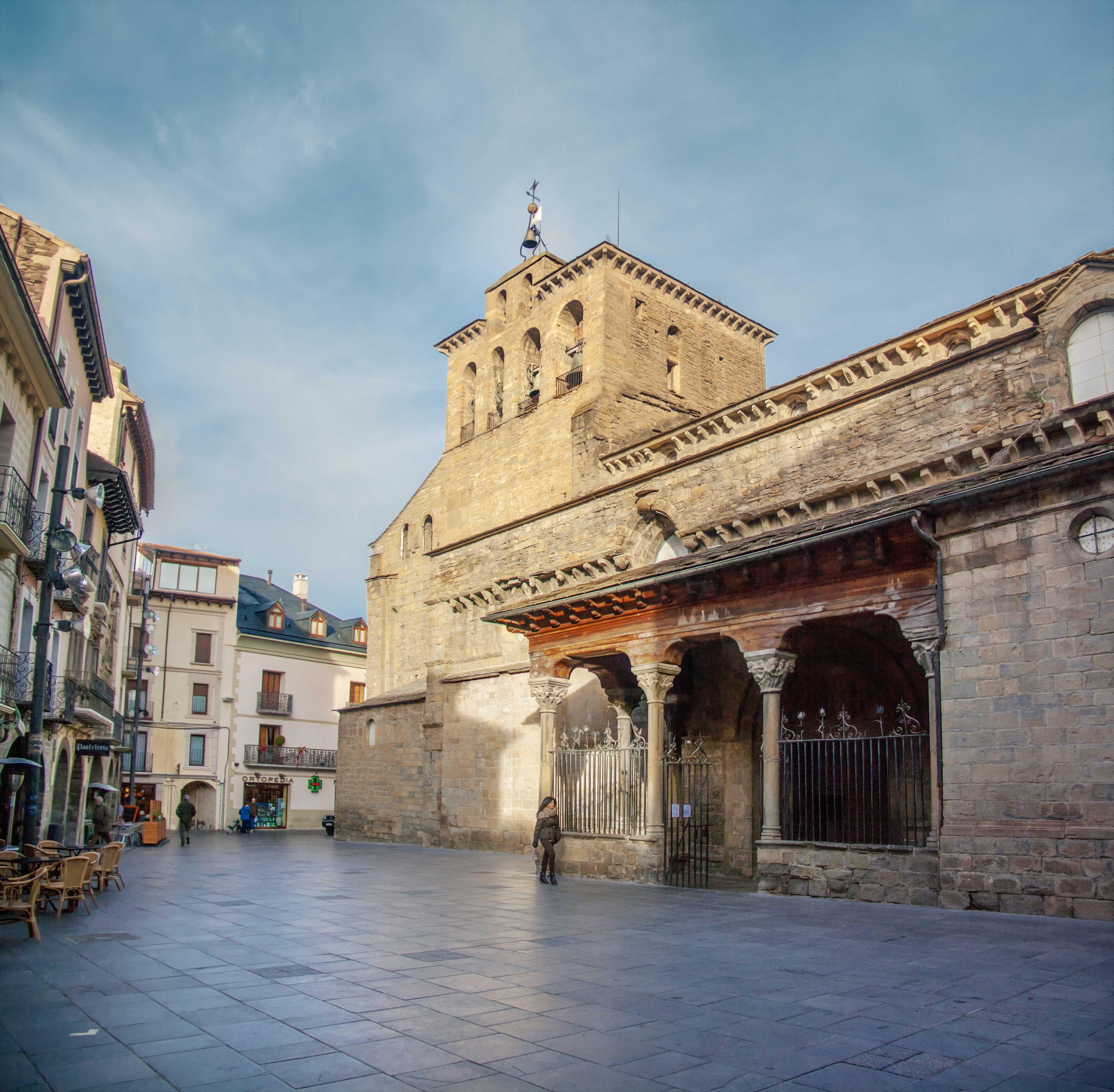 Jaca, España